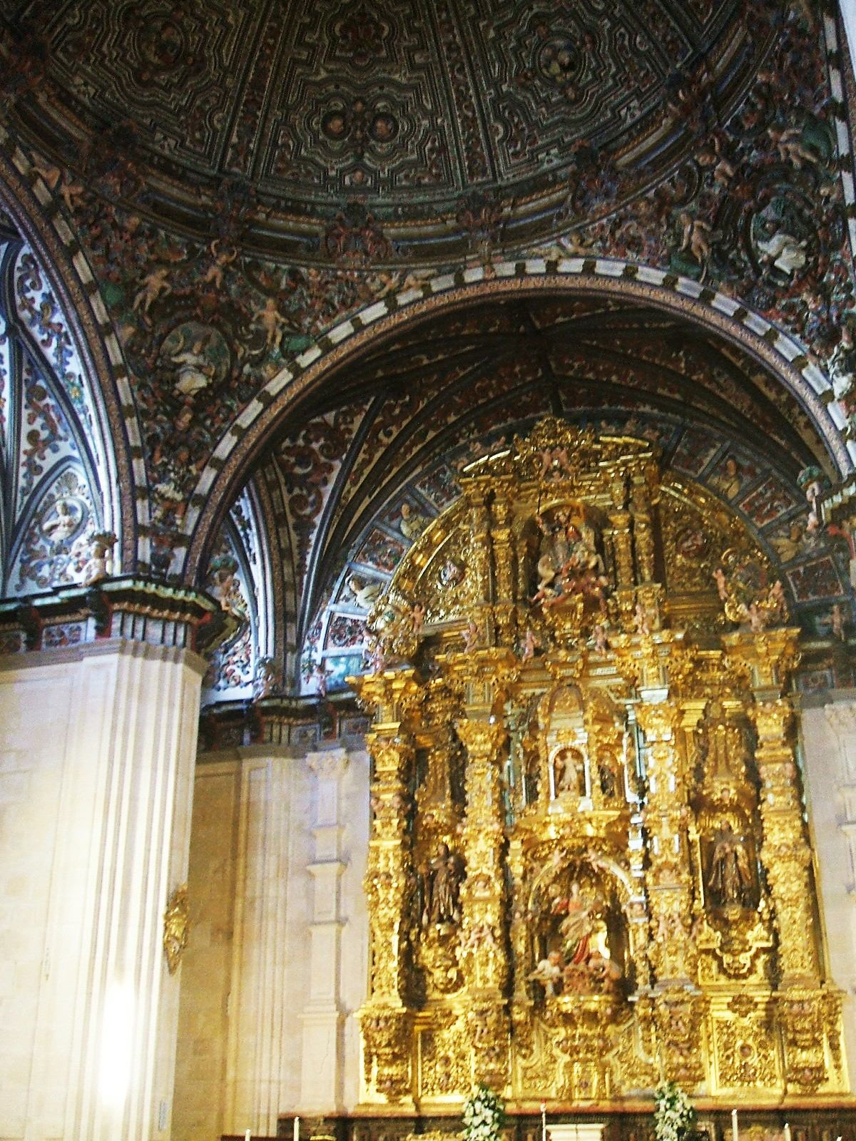 Capilla de Santa Tecla, Catedral de Burgos, España